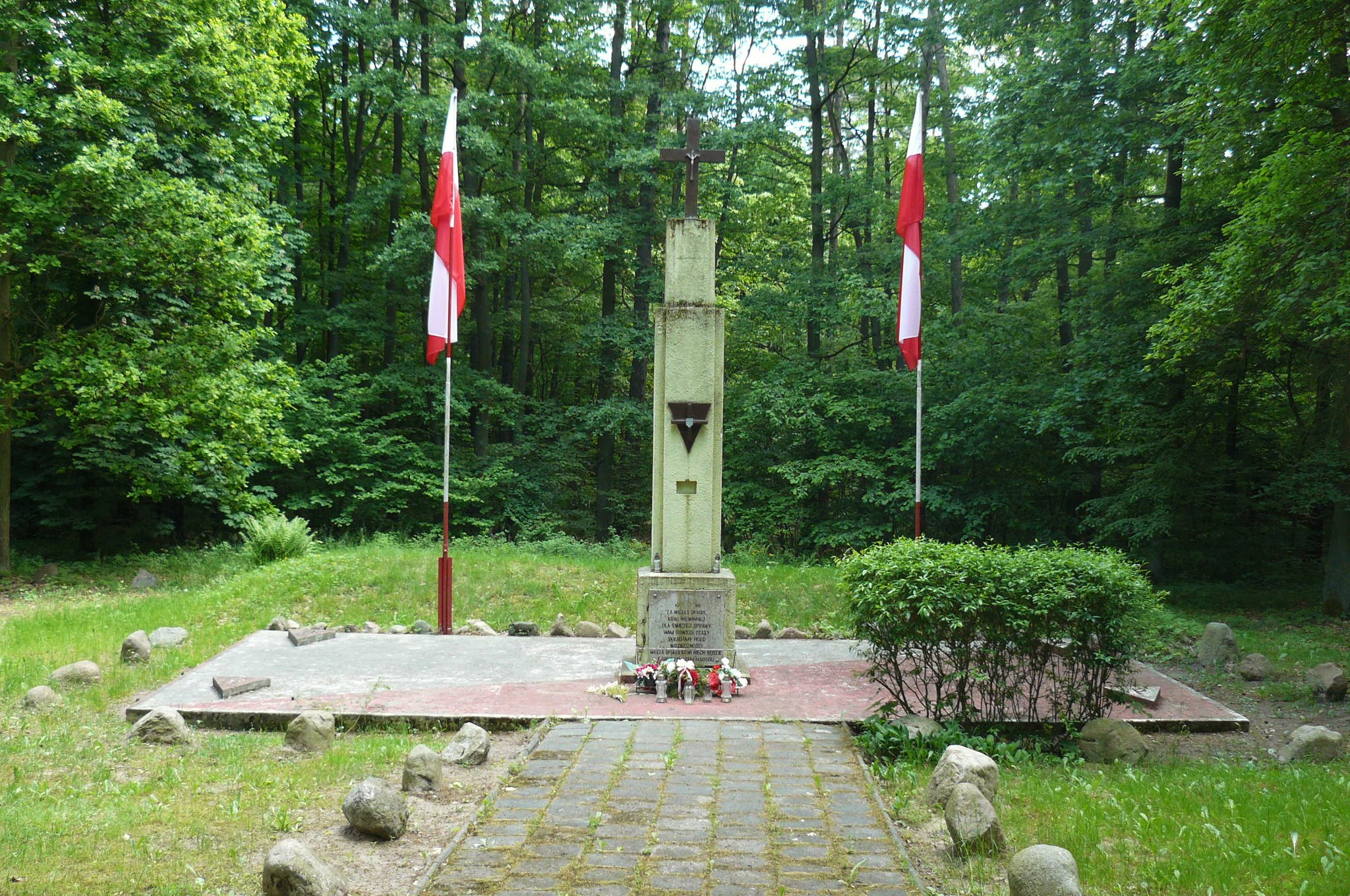 Las Bytyński.